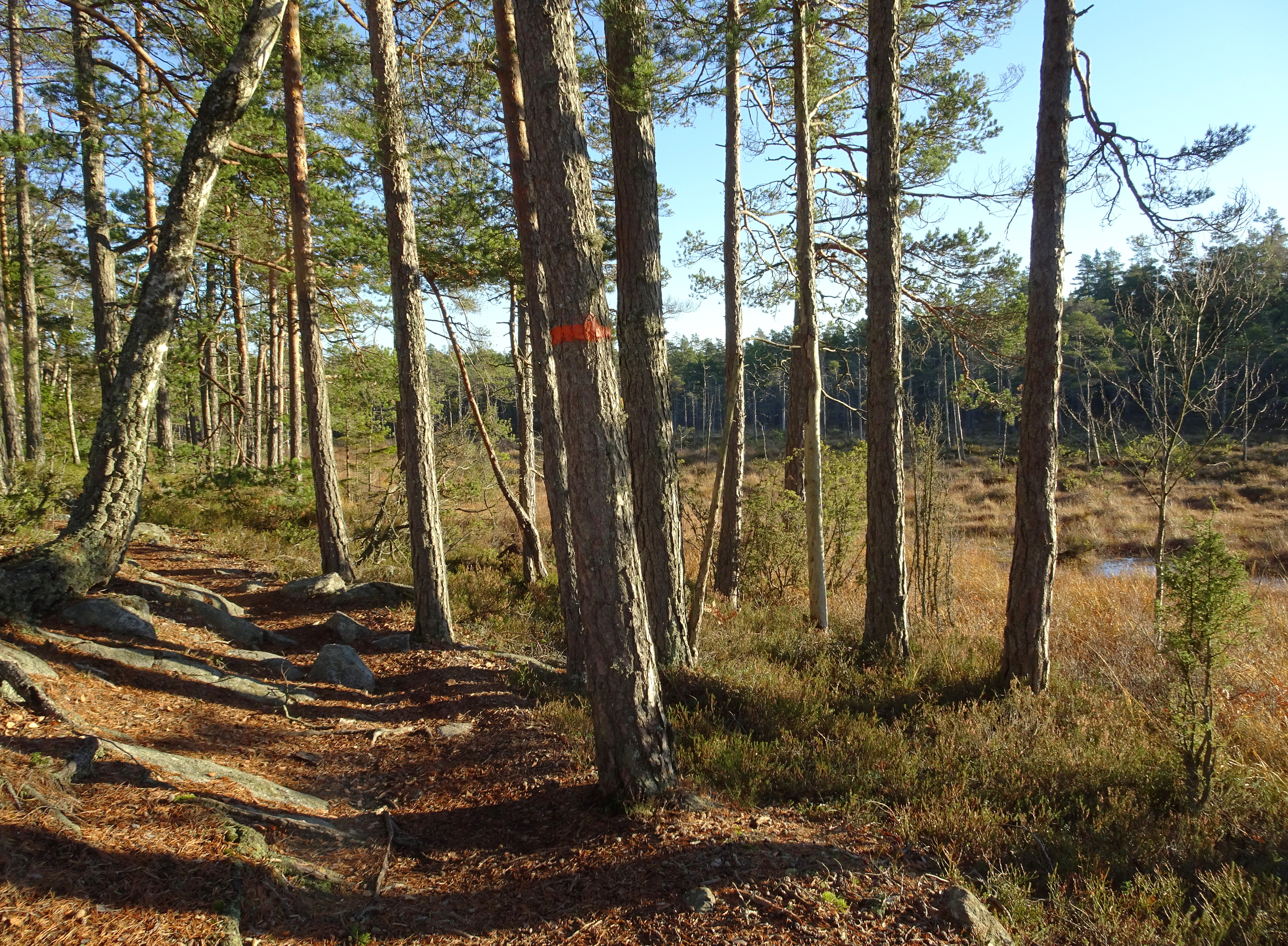 Tornbergets naturreservat vid Tornberga sjön (Sörmlandsleden)